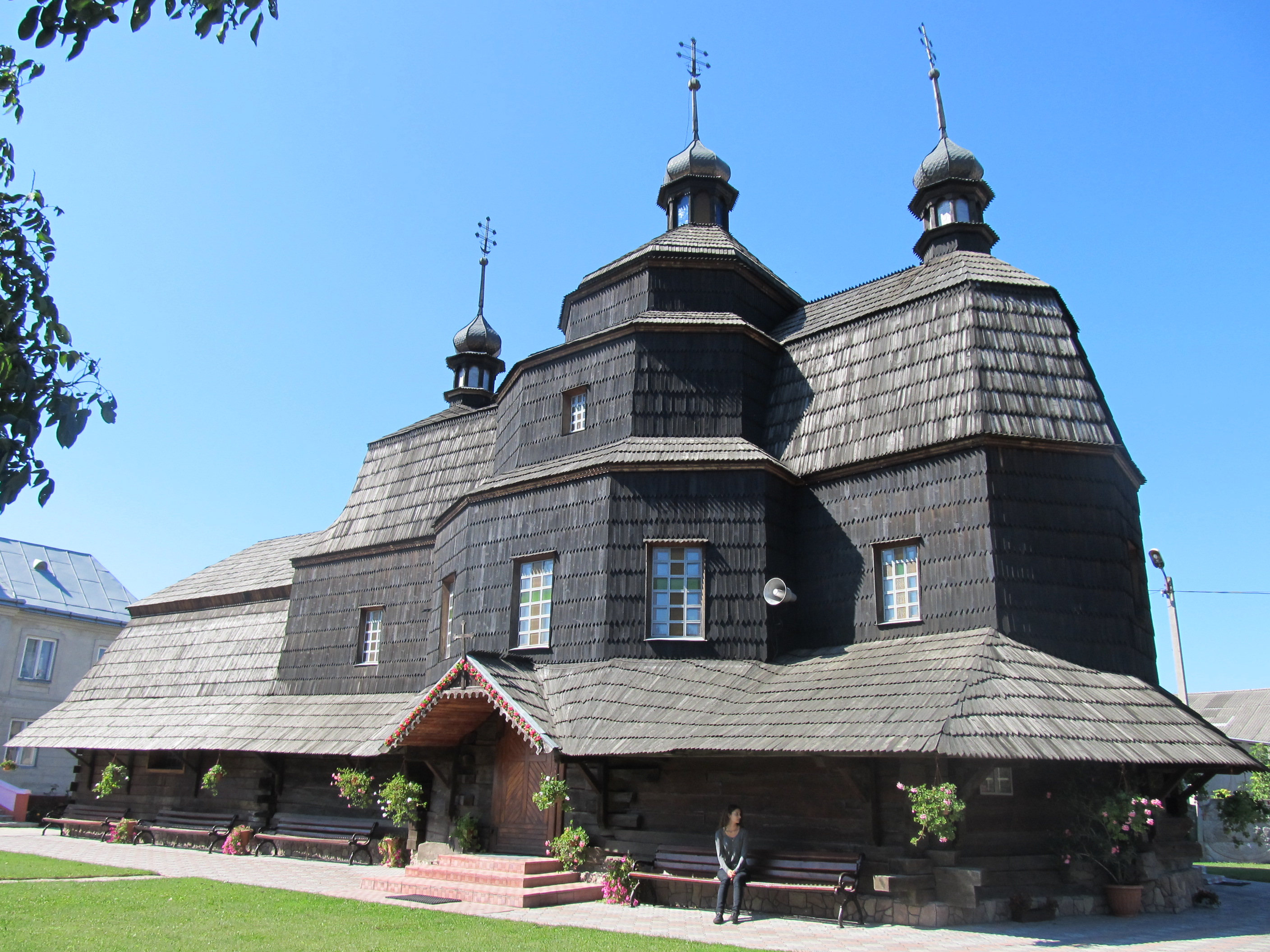 Церква Вознесіння, Чортків, вул. Залізнична